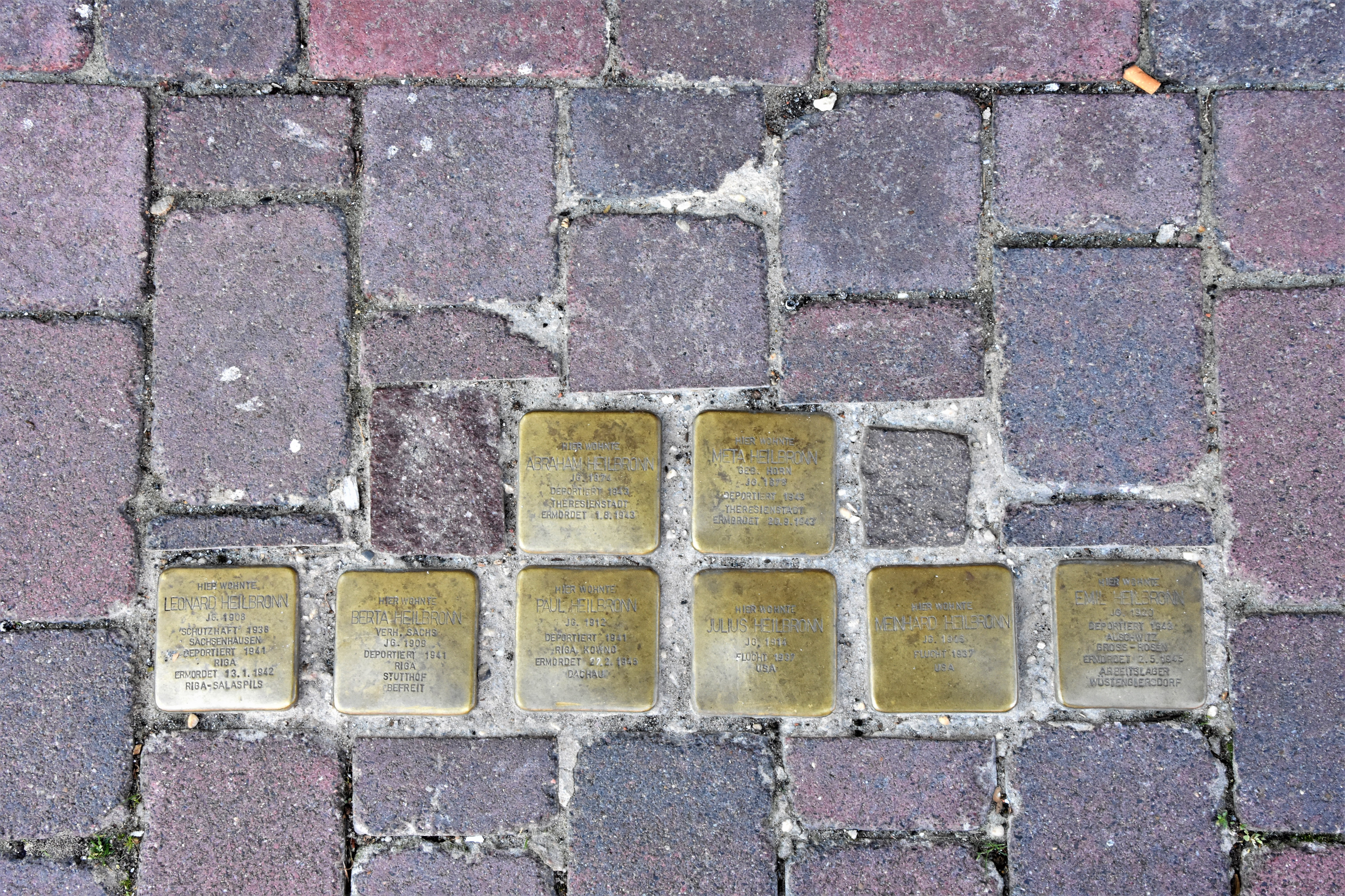 Mühlenstraße 1, Lengerich (Emsland)-Stolperstein Gesamtlage